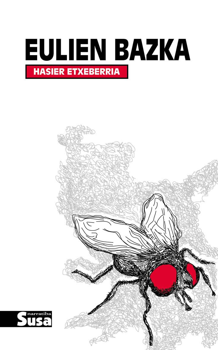 Hasier Etxeberriaren Eulien bazka liburuaren azala